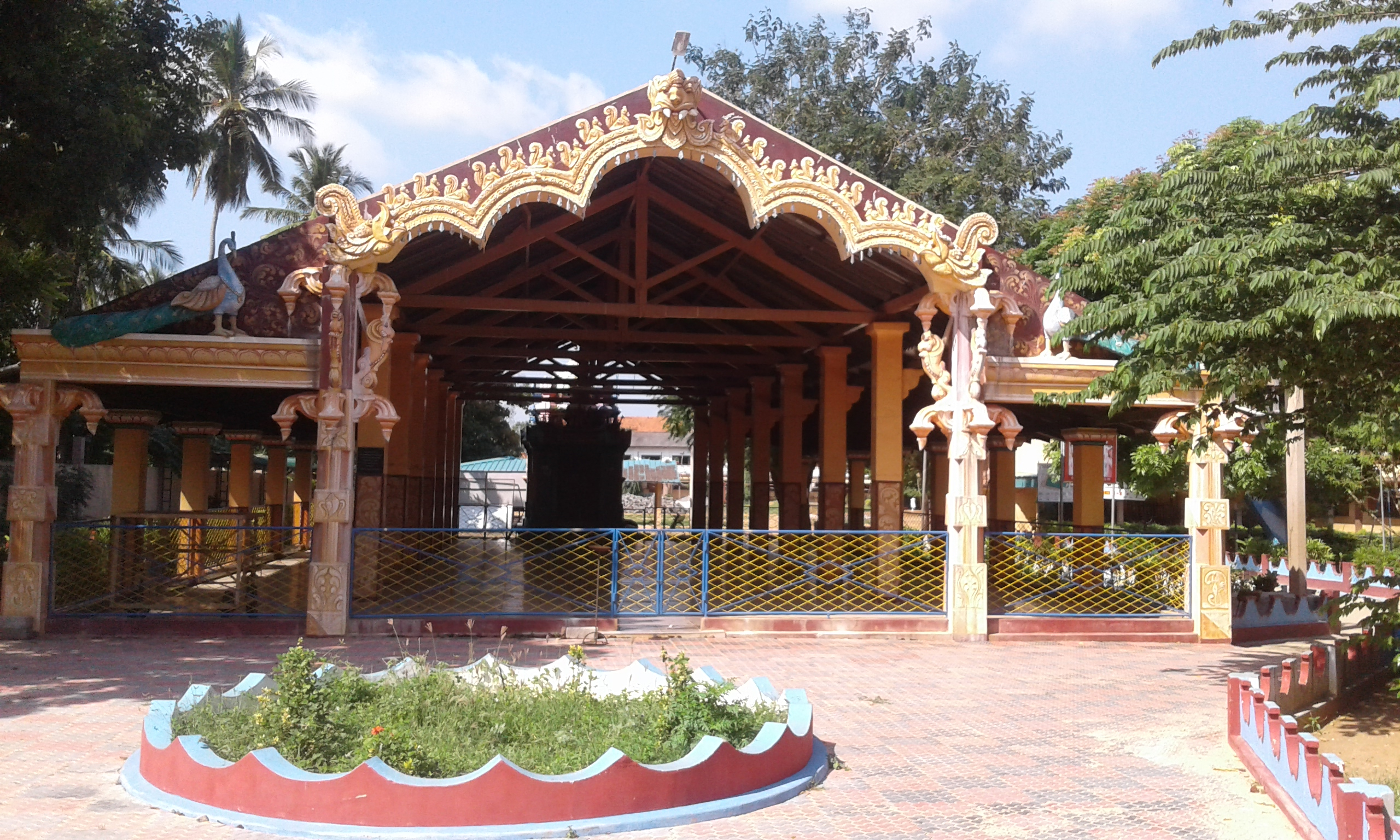 கல்லூரியின் புதிய முருகன் ஆலயத்தின் தோற்றம்